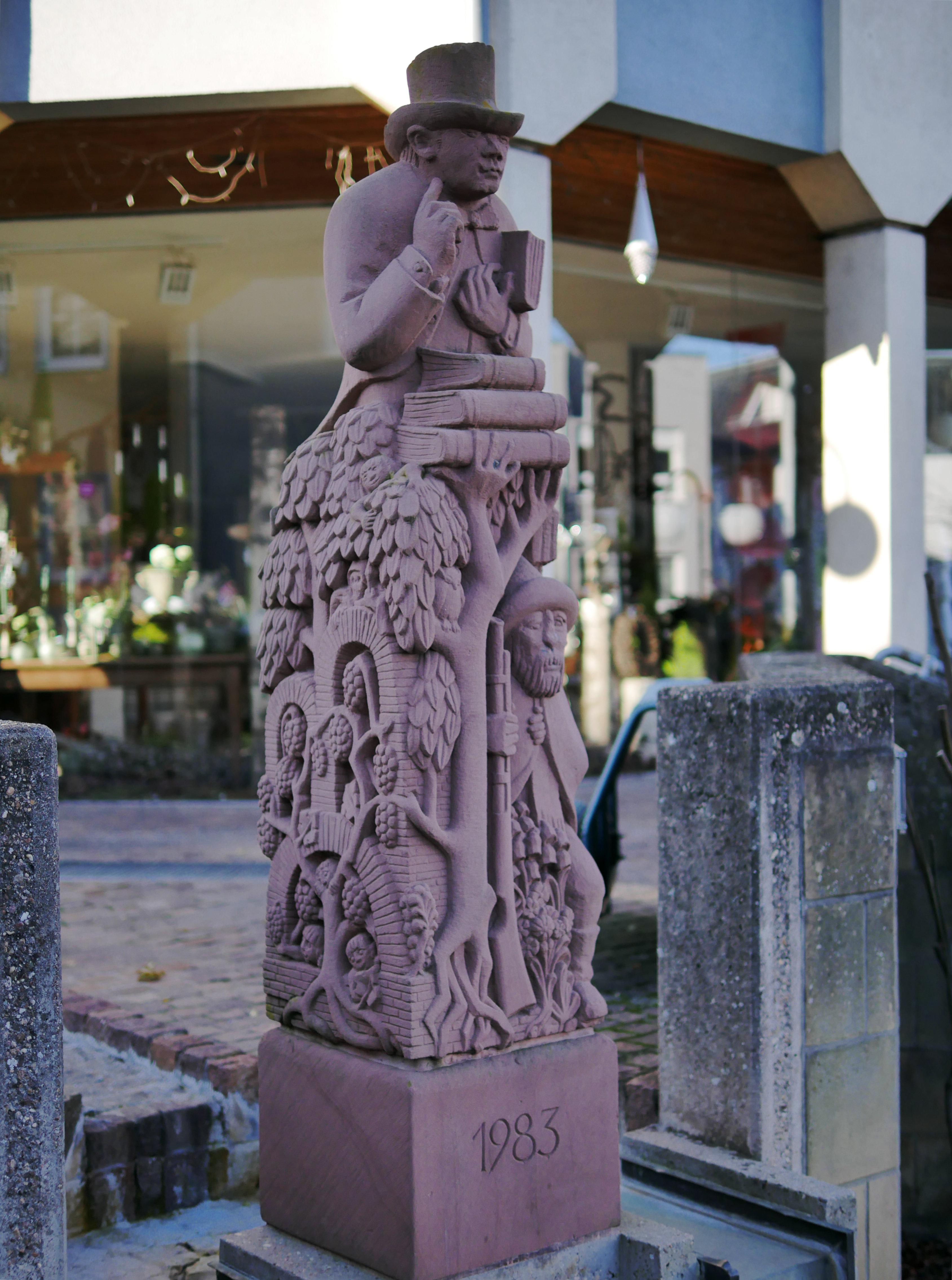 Brunnenstele: Der "Konzer Doktor" ist das Wahrzeichenvon Konz und geht auf den Konzer Pfarrer und Schulmann Georg Canaris (1740–1819) zurück. Neben ihm tummeln sich Sagengestalten, u. a. der Fotschelgeist und das Breesterfrauchen.